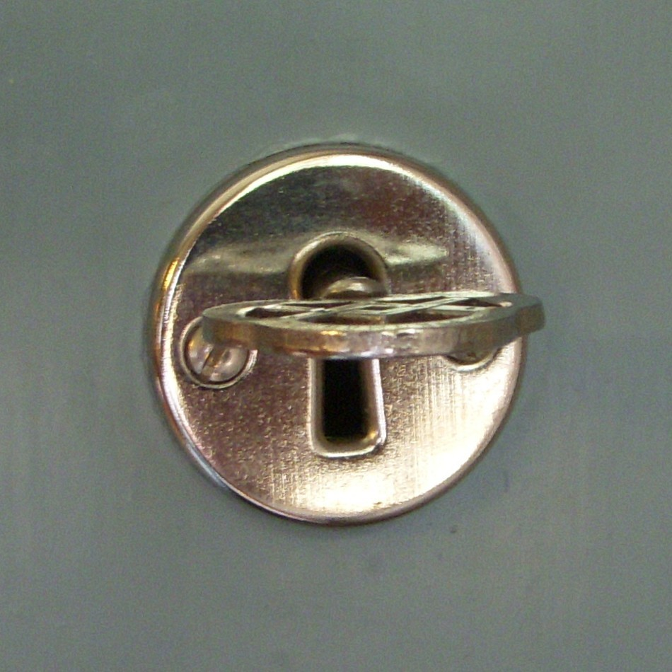 En nyckel och nyckelskylt till ett garderobslås från 1950-talet